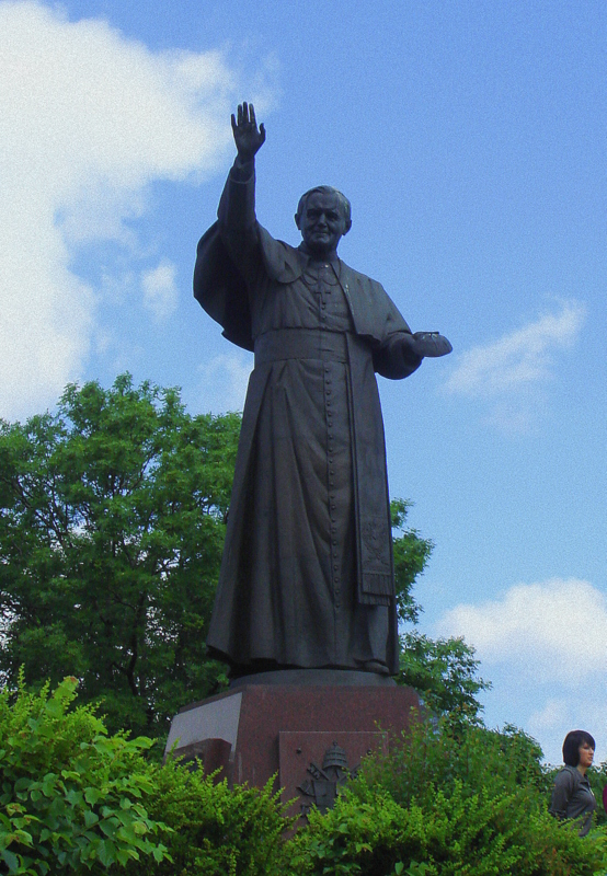 Częstochowa, zespół klasztorny paulinów na Jasnej Górze